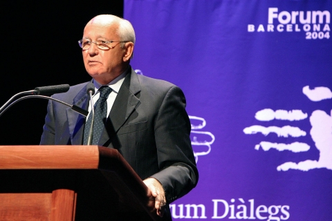 Mikhail Gorbachev no Fórum Urbano Mundial Barcelona.